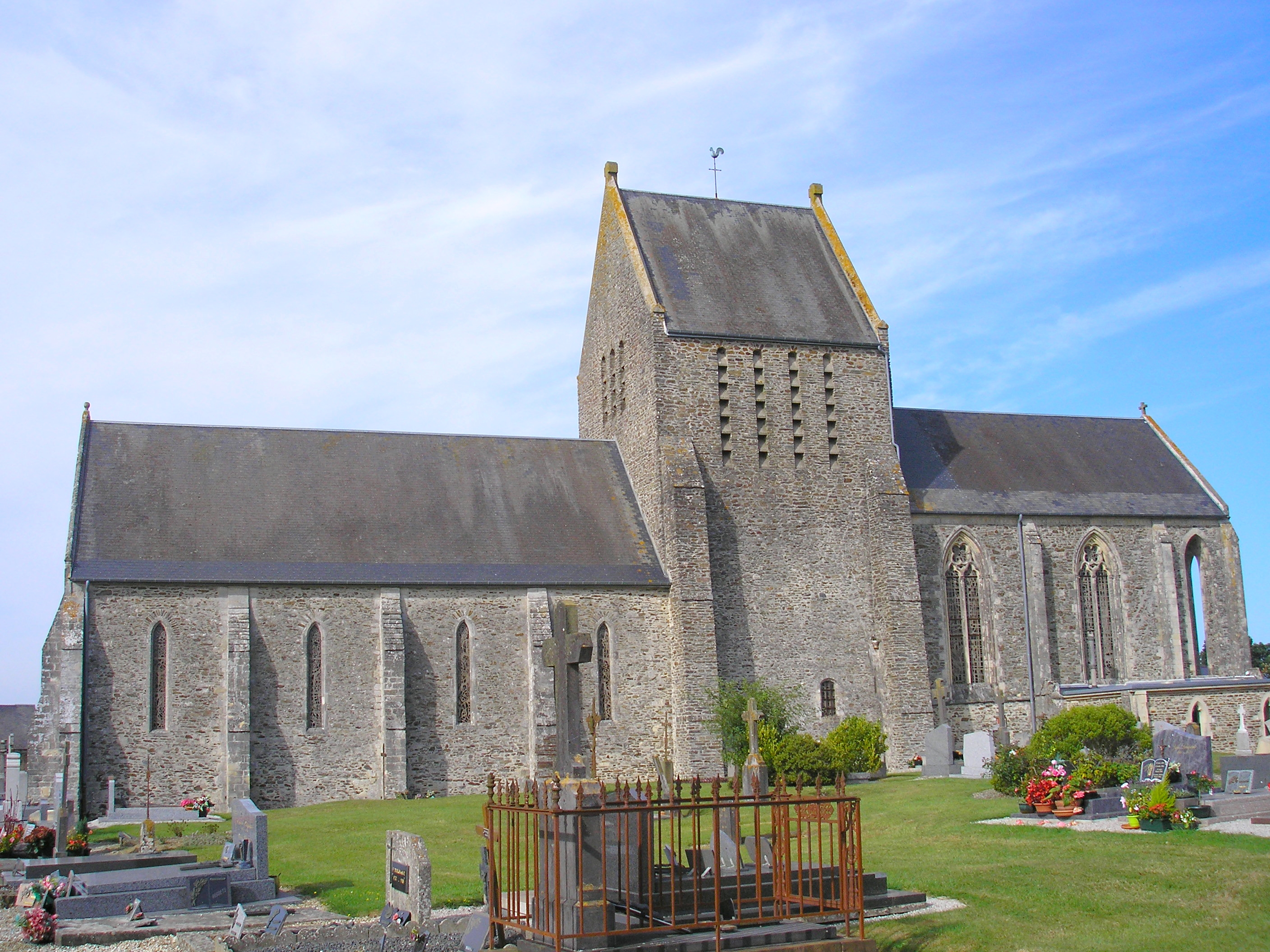 Couvains (Normandie, France). L'église.